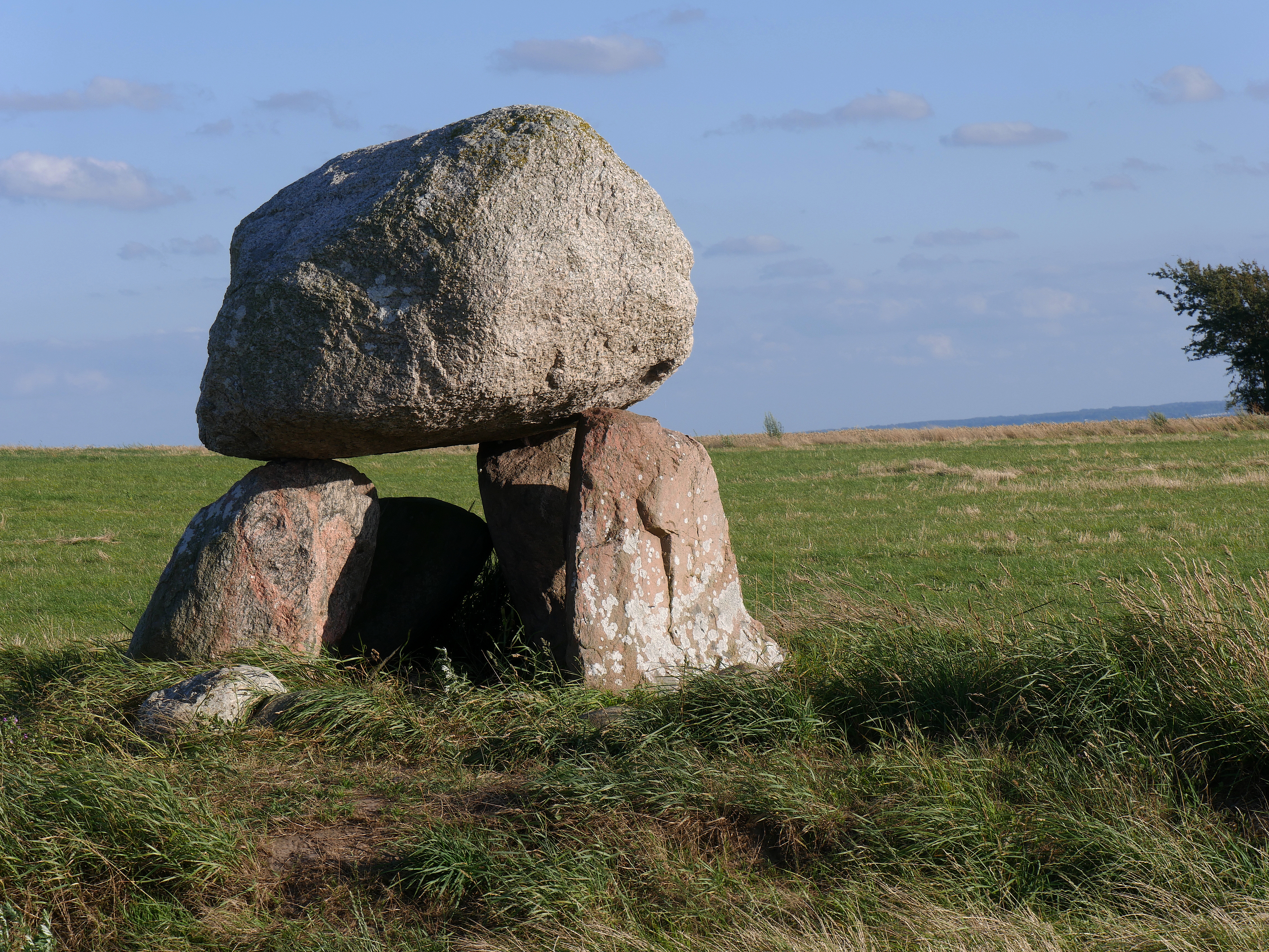 Megalithgrab 1 beim Leuchtturm von Helnaes. Die freistehenden Reste einer Nord-Süd orientierten trapezoiden Kammer bestehen aus je zwei Tragsteinen im Westen und Osten, von denen einer in die Kammer ragt. Der große Deckstein ruht auf drei Tragsteinen. Die Nord- und die Südseite sind offen. Der Dolmen liegt in den Resten seines Hügels in der Nähe des Leuchtturms Helnæs Fyr. Aufnahme von Norden.